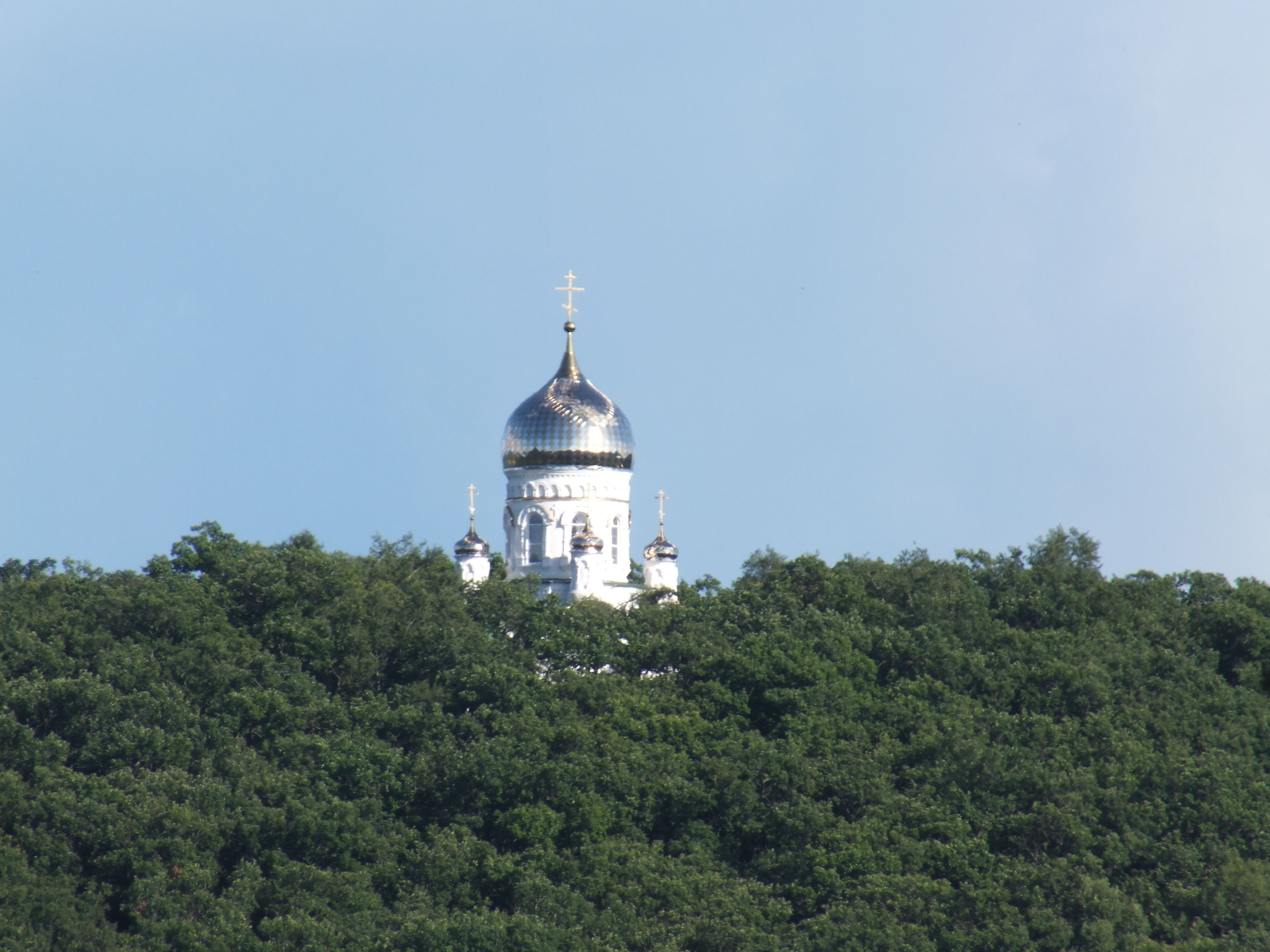 Svyato-Troitsky Nikolaevsky Monastery in Primorye